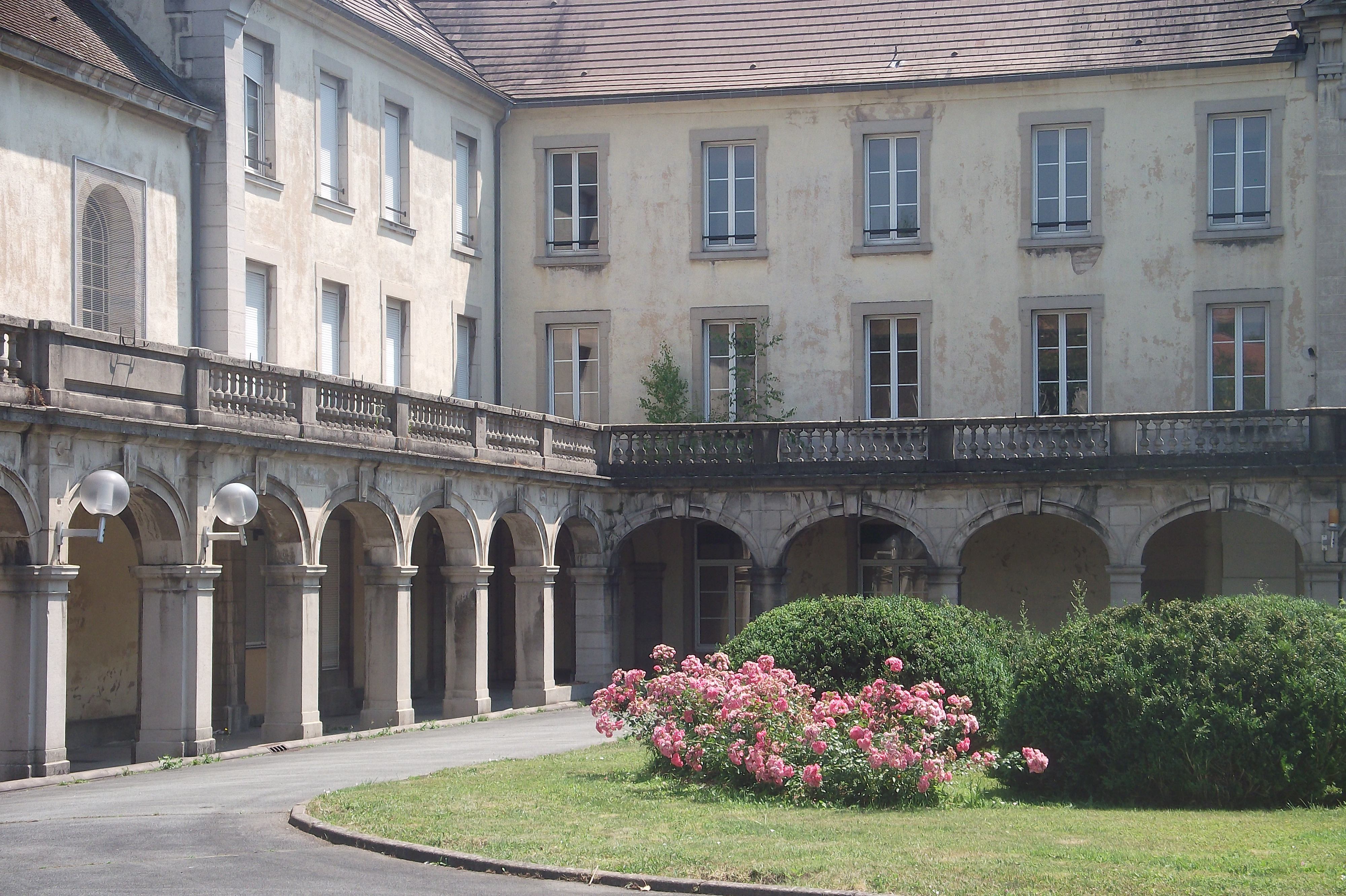 L'Hôpital Paul-Morel de Vesoul (Haute-Saône, Franche-Comté)